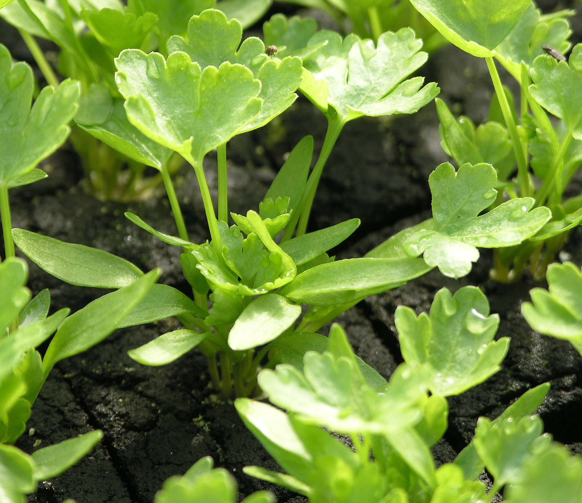 Glatte Petersilie Gigante d' Italy Erdpresstopf